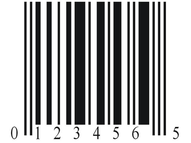 Do Vương Ngân Hà tạo ra, đưa vào sử dụng trong phạm vi công cộng.